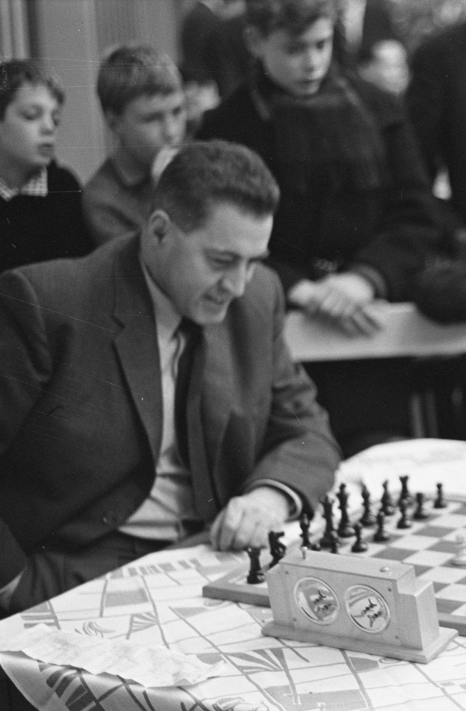 Hoogovenschaaktoernooi in Beverwijk 1962. Cenek Kottnauer.